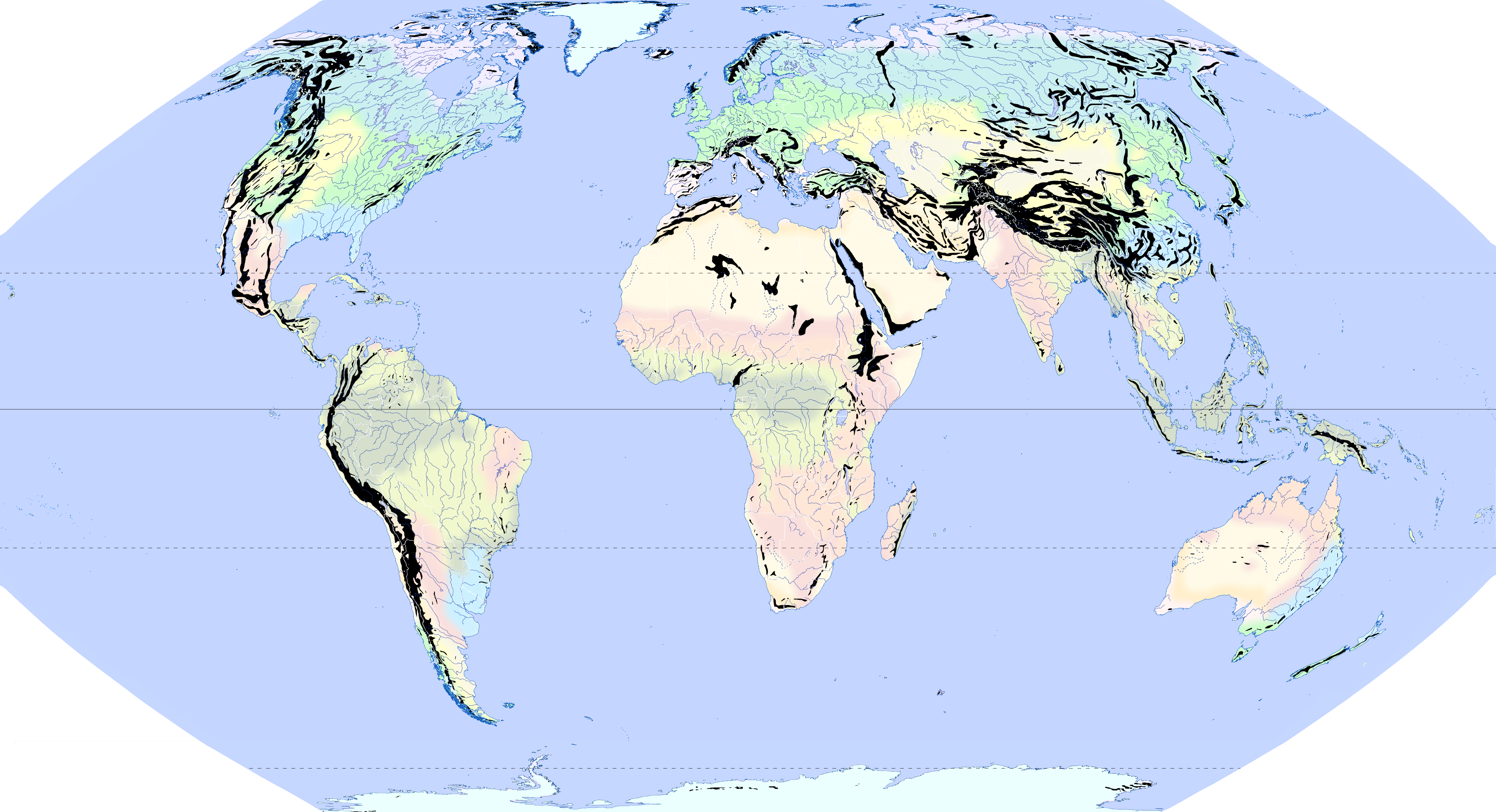 Hochgebirge der Erde